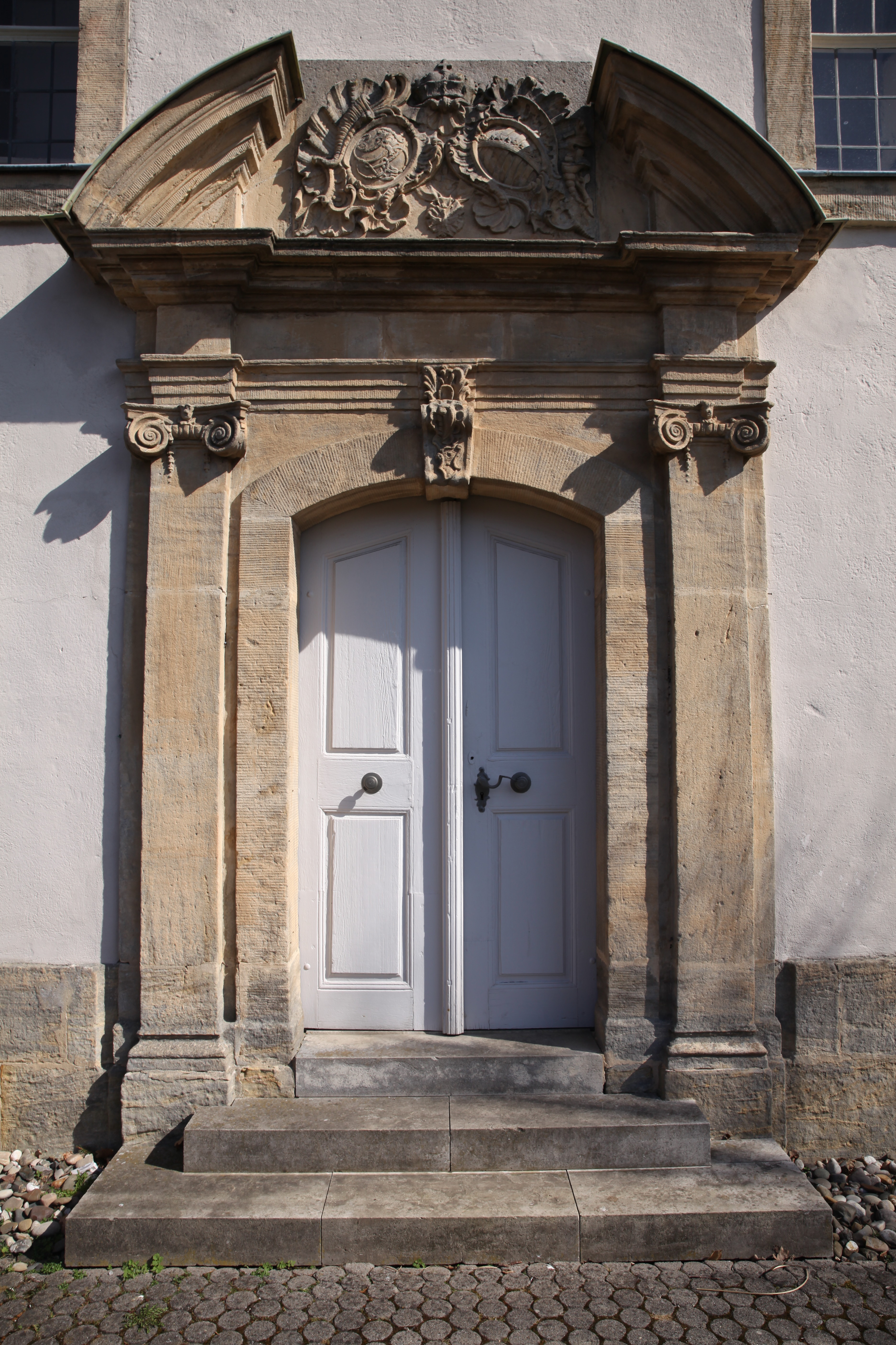 Westportal, Evangelisch-Lutherische Kirche in Rossach, Landkreis Coburg